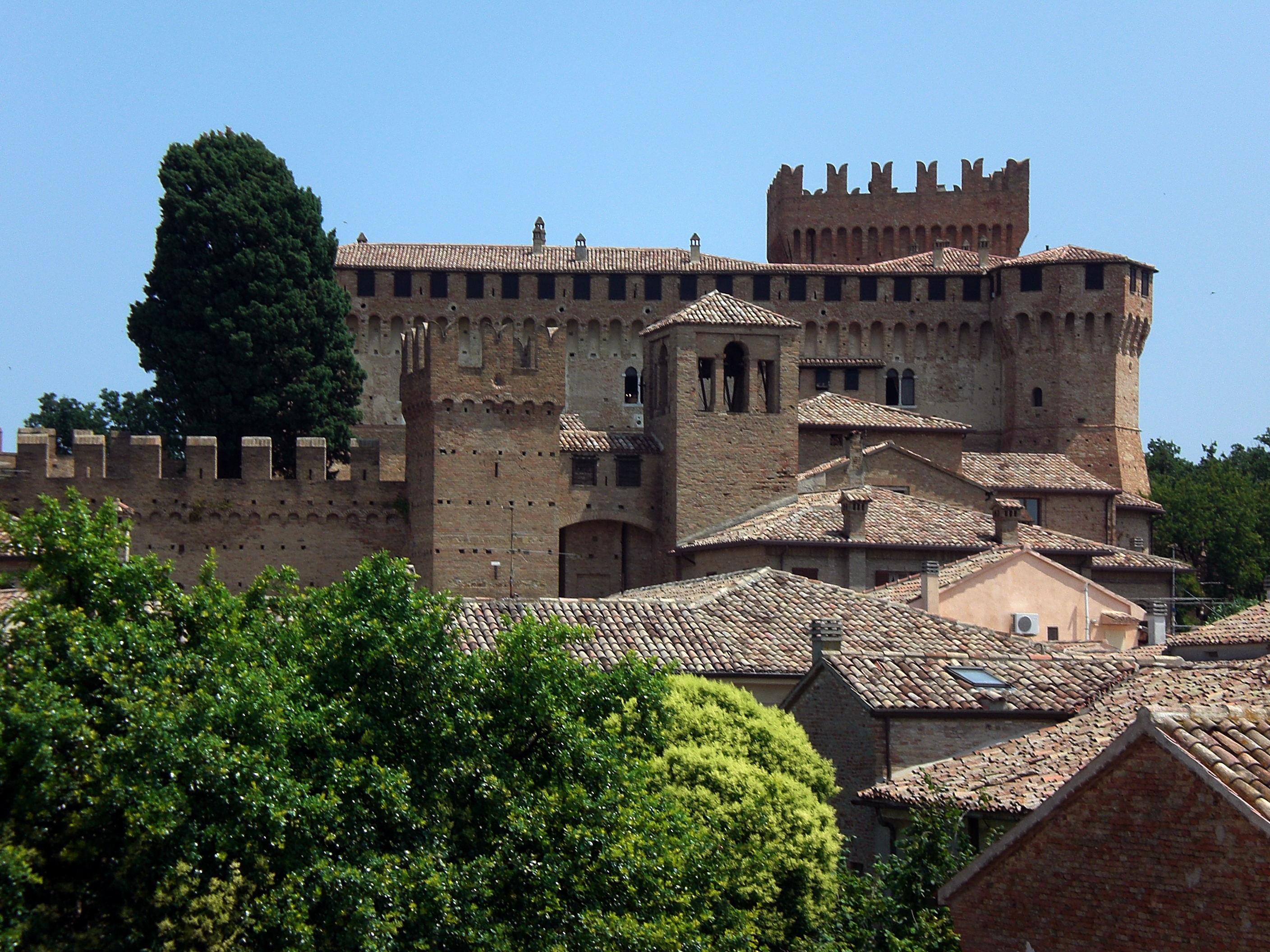 Veduta della rocca di Gradara